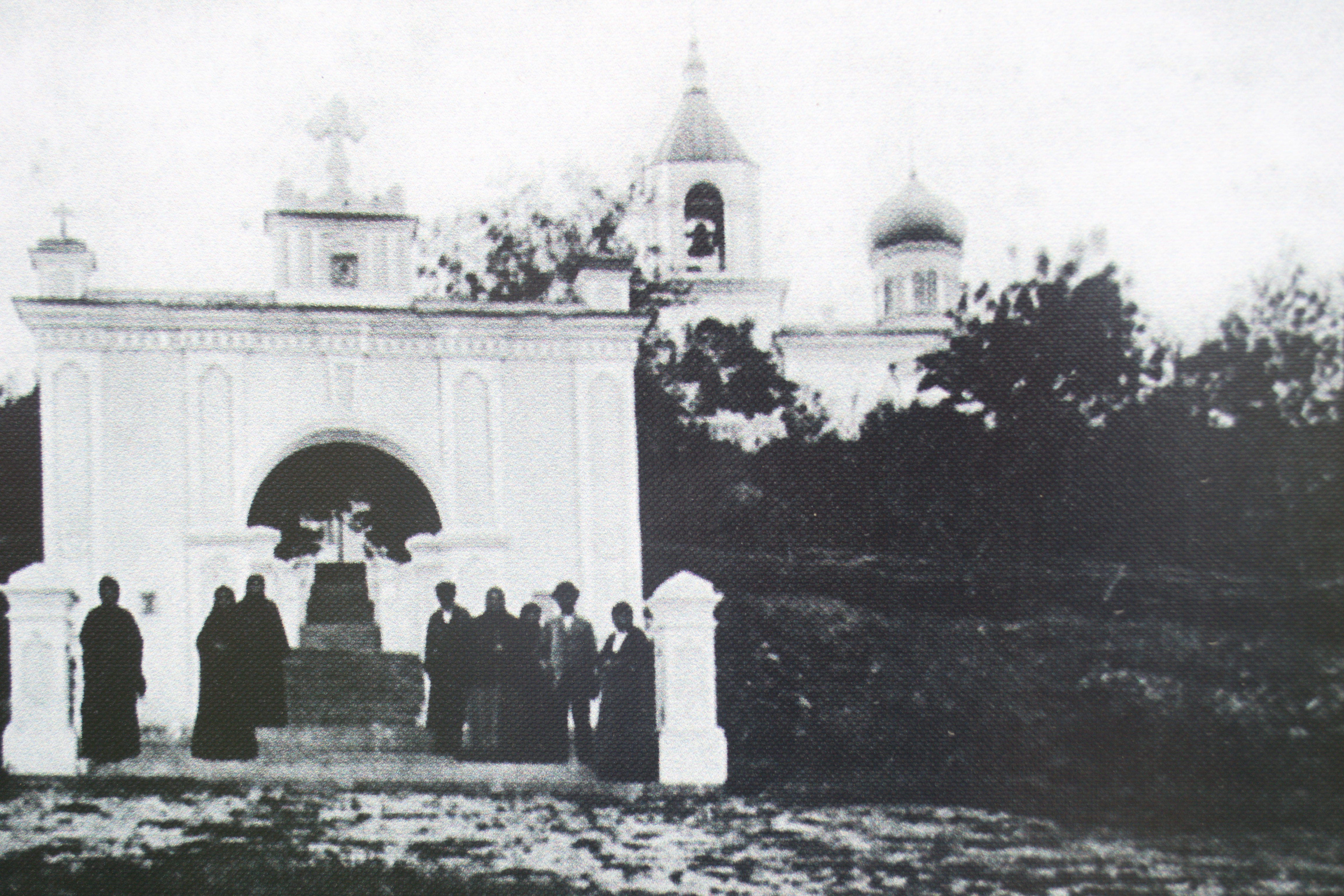 Фото Катерлезского Свято-Георгиевского монастыря в начале 20 века